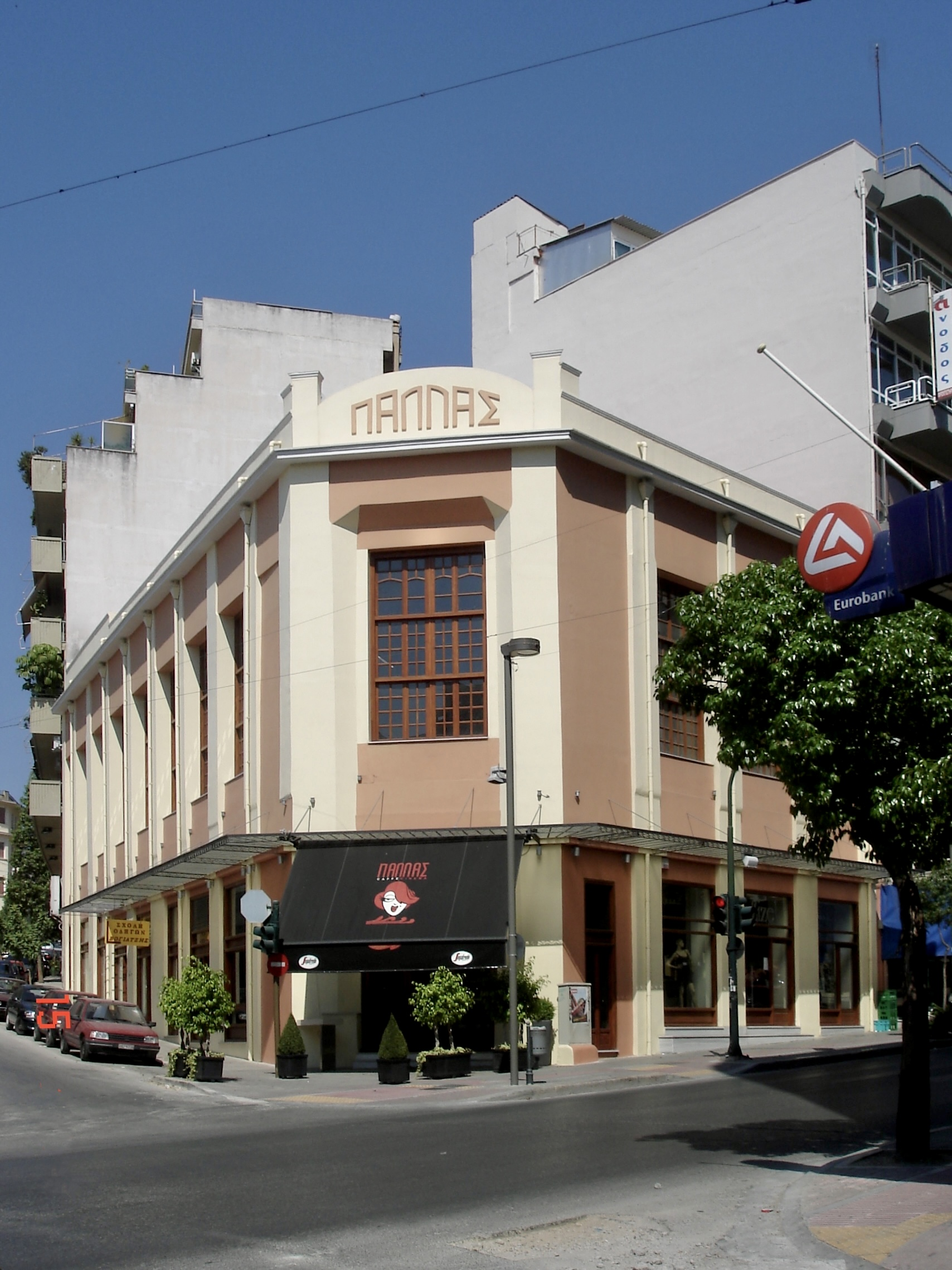 Cinema Pallas, Patra ,Achaea ,Greece Κινηματογράφος Παλλάς Πάτρας